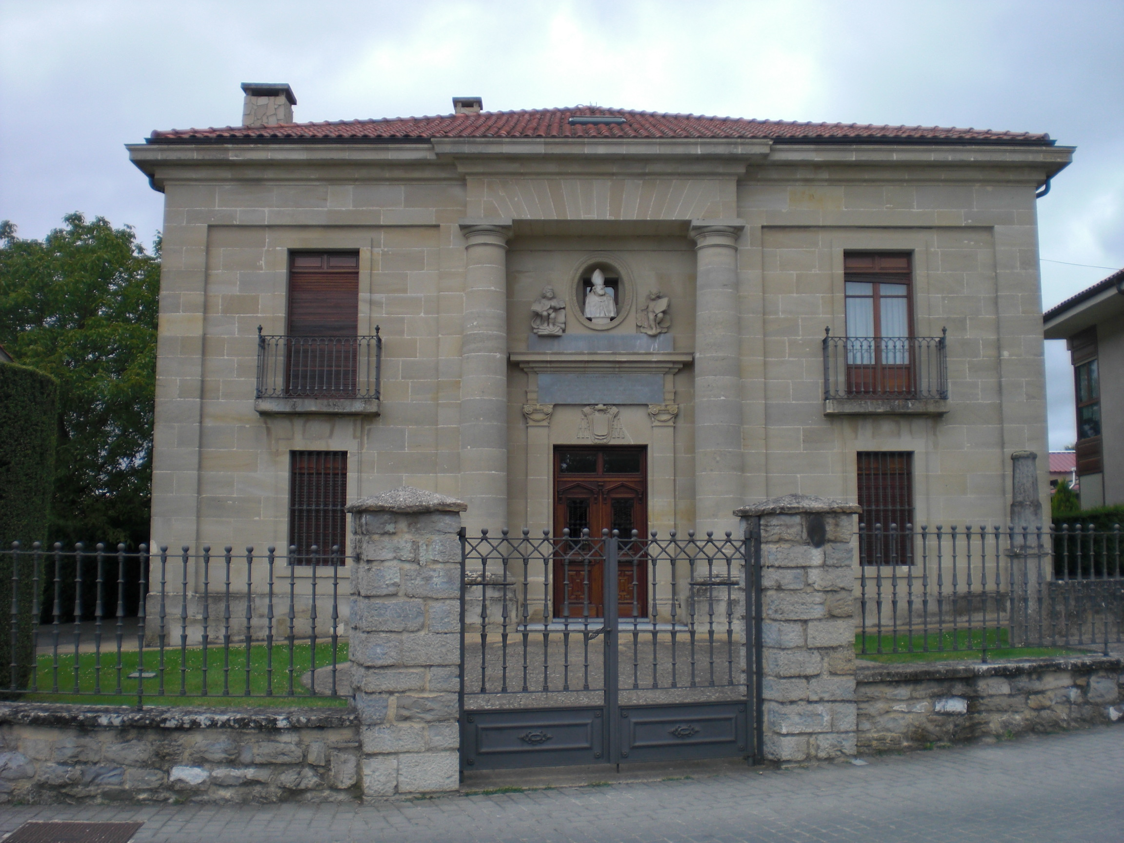 Justo Antonio Olagibelen Santuaren etxea, Armentia.